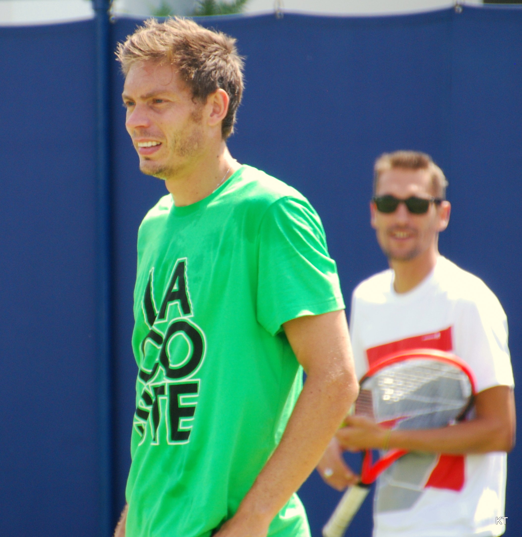 Nicolas Mahut